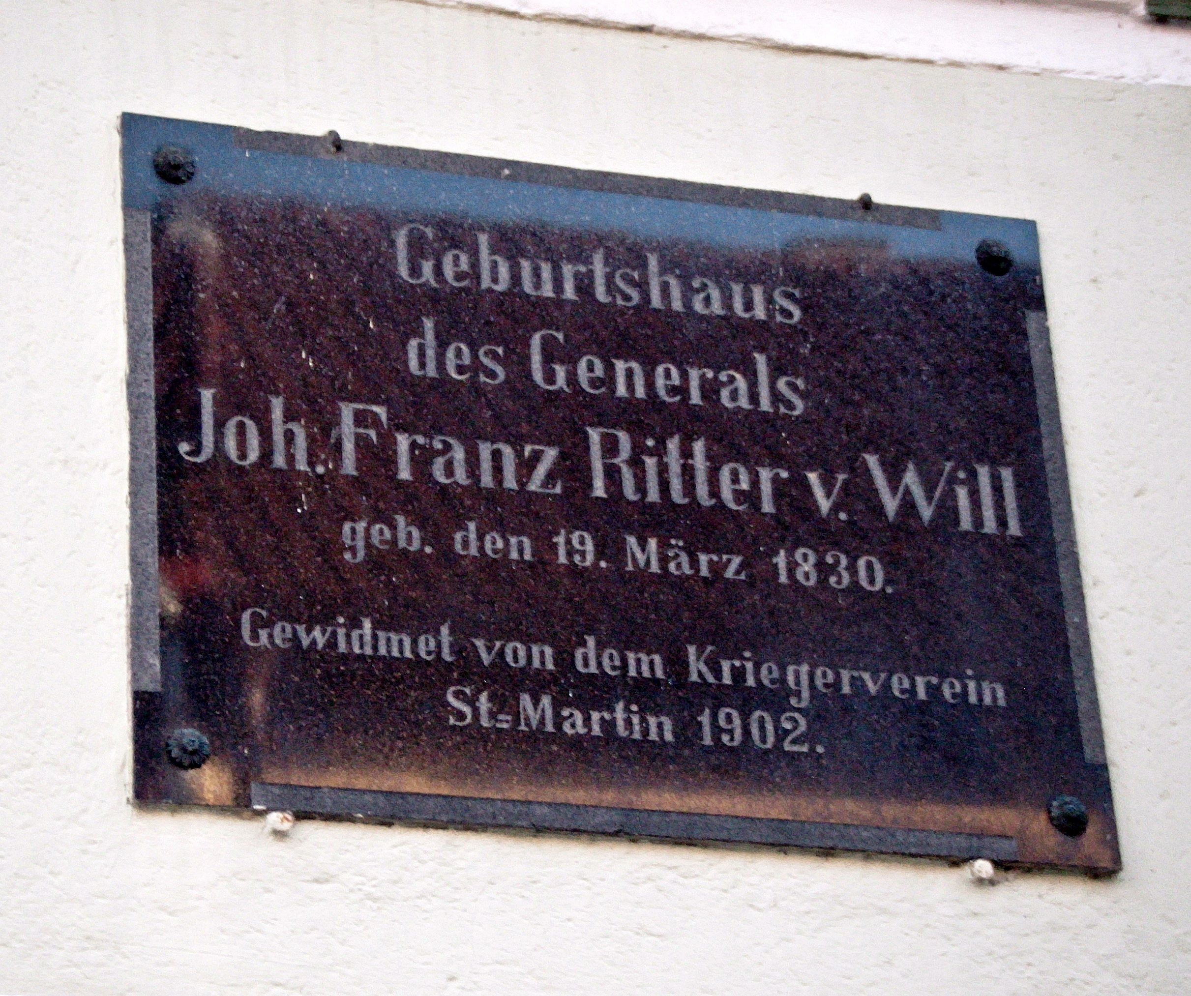 Sankt Martin (Pfalz), Gedenktafel General Franz Ritter von Will (1830-1912), am Geburtshaus